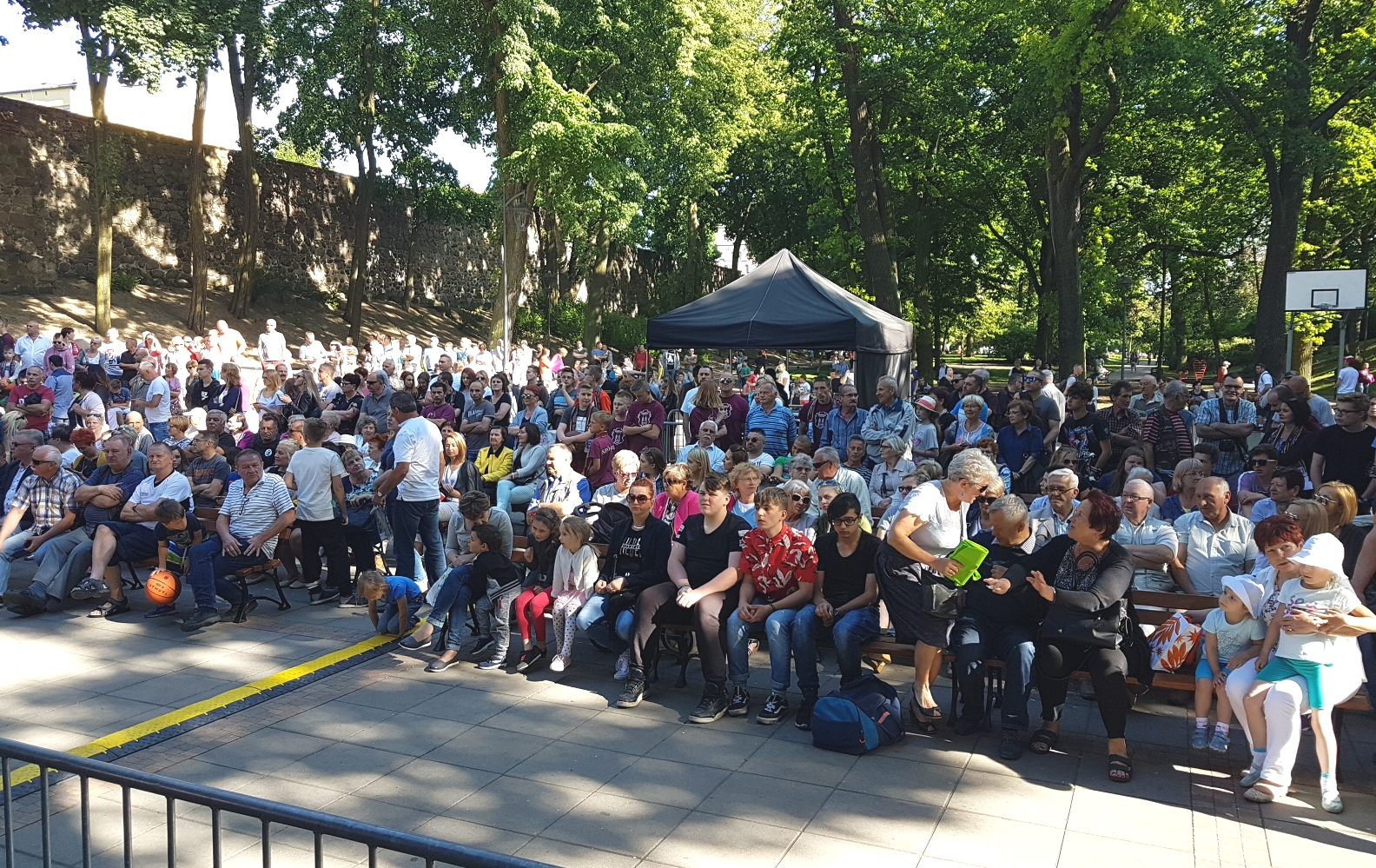 Stargardzka feta po awansie Spójni (19.05.2018)